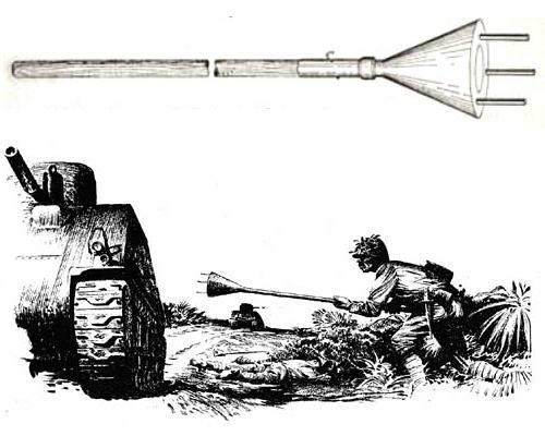 Dessin tiré de l'Intelligence Bulletin de l'U.S. Army, volume III n°7 de mars 1945.